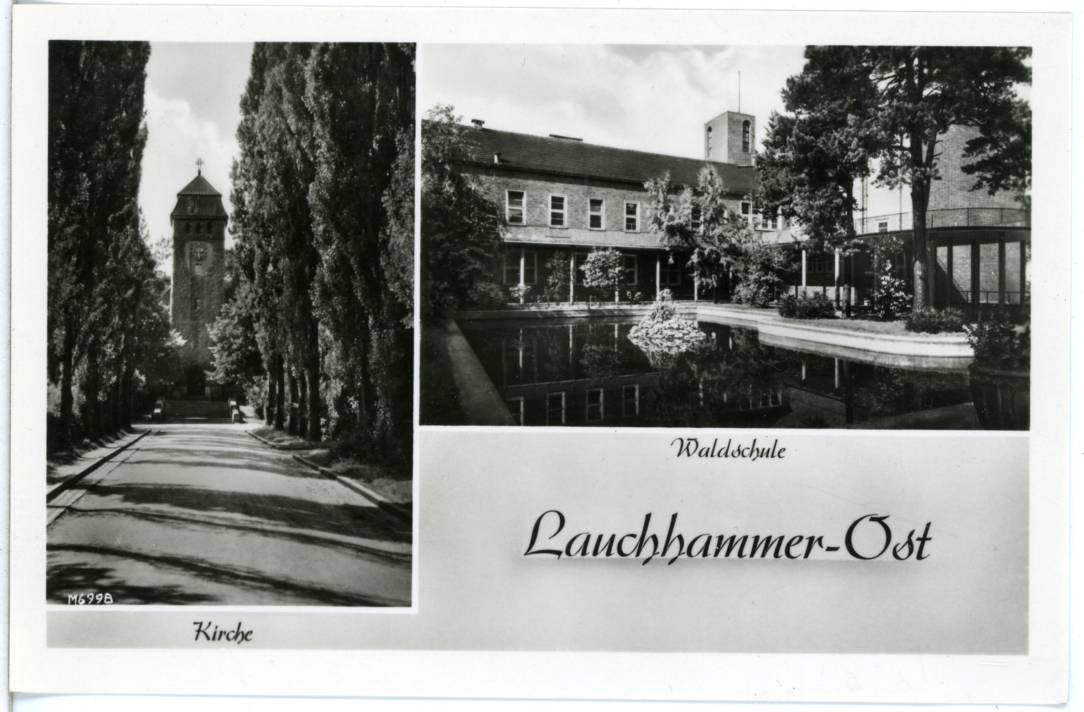 Lauchhammer; Ost, Kirche, Waldschule This postcard is from publisher Brück & Sohn in Meißen ( postcard has a unique number 29257 and is available in a higher resolution at the publisher. This images was uploaded in a cooperation project between Wikipedians and the publisher.